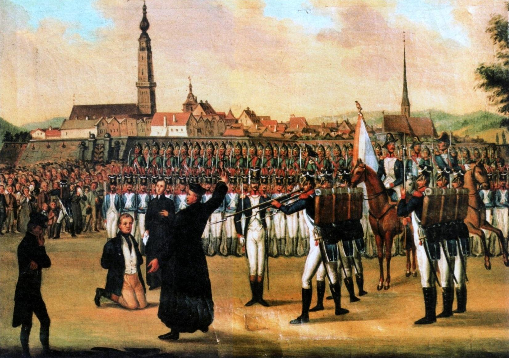 Darstellung der Hinrichtung Johann Philipp Palms in Braunau am 26. August 1806 durch französische Truppen. Palm wurde vorgeworfen die antifranzösische Schrift Deutschland in seiner tiefen Erniedrigung verbreitet zu haben